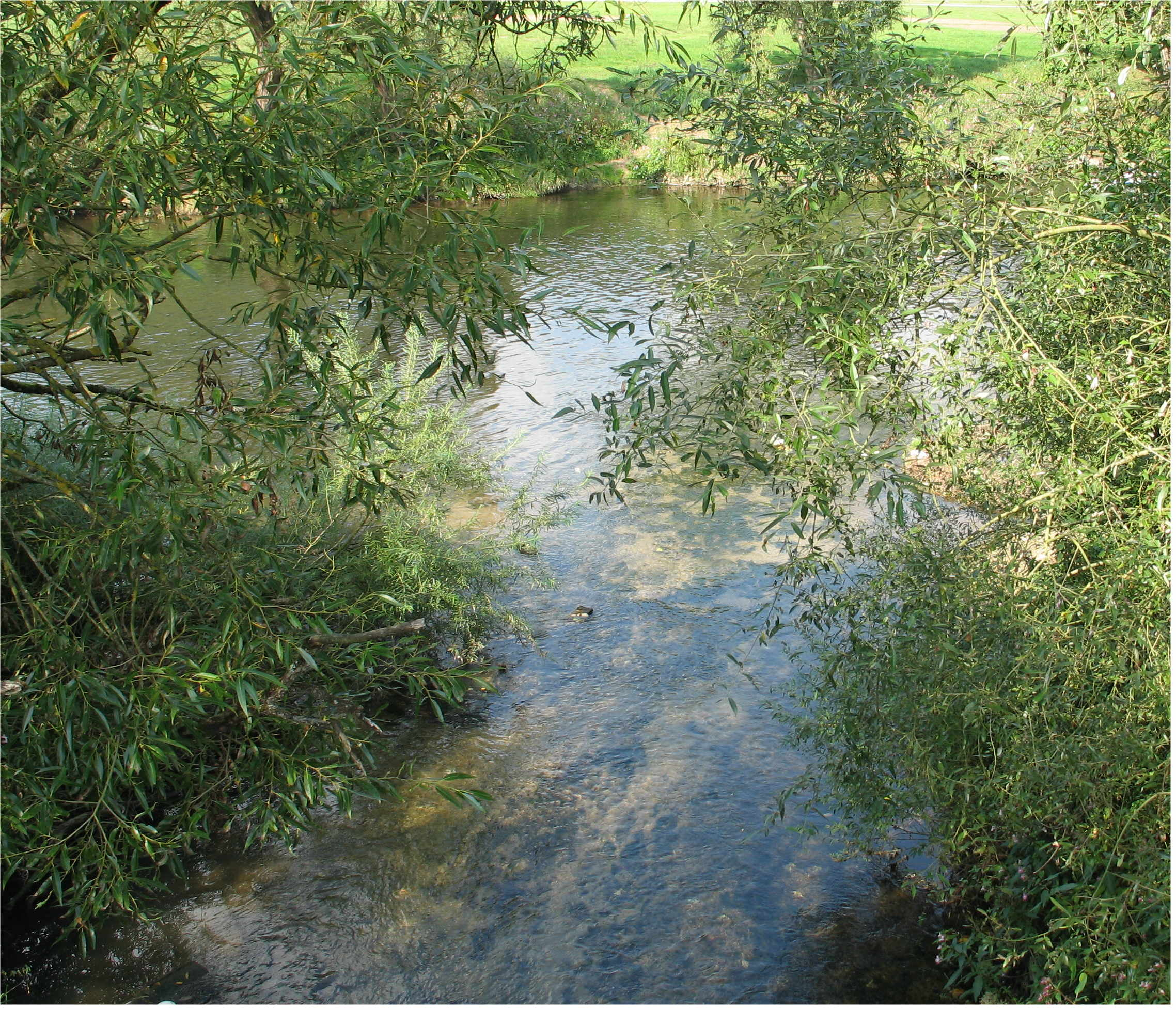 D'Schwaarz Ernz déi an d'Sauer leeft (Grondhaff).